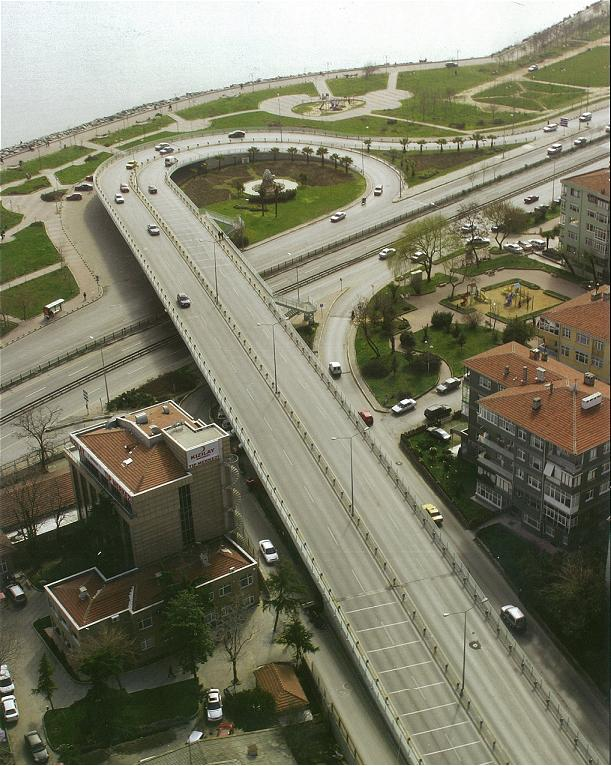 Ben çektim, Temmuz 2006